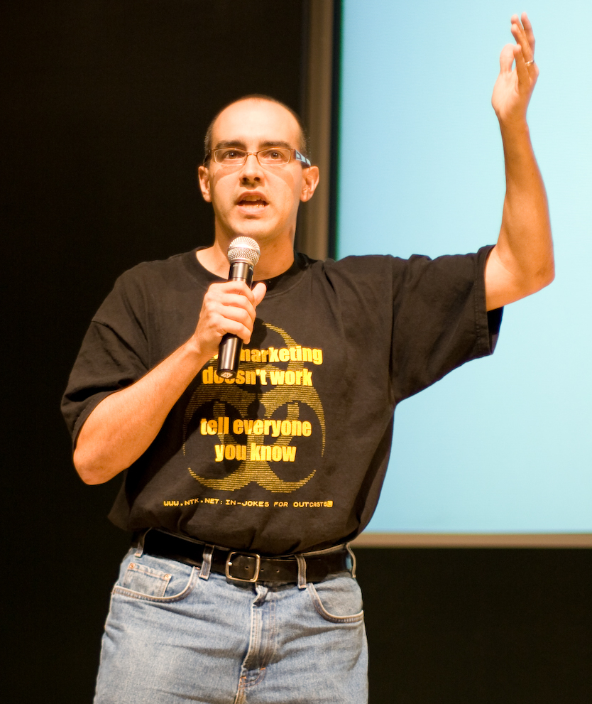 Gnomedex 2007 - Dave McClure